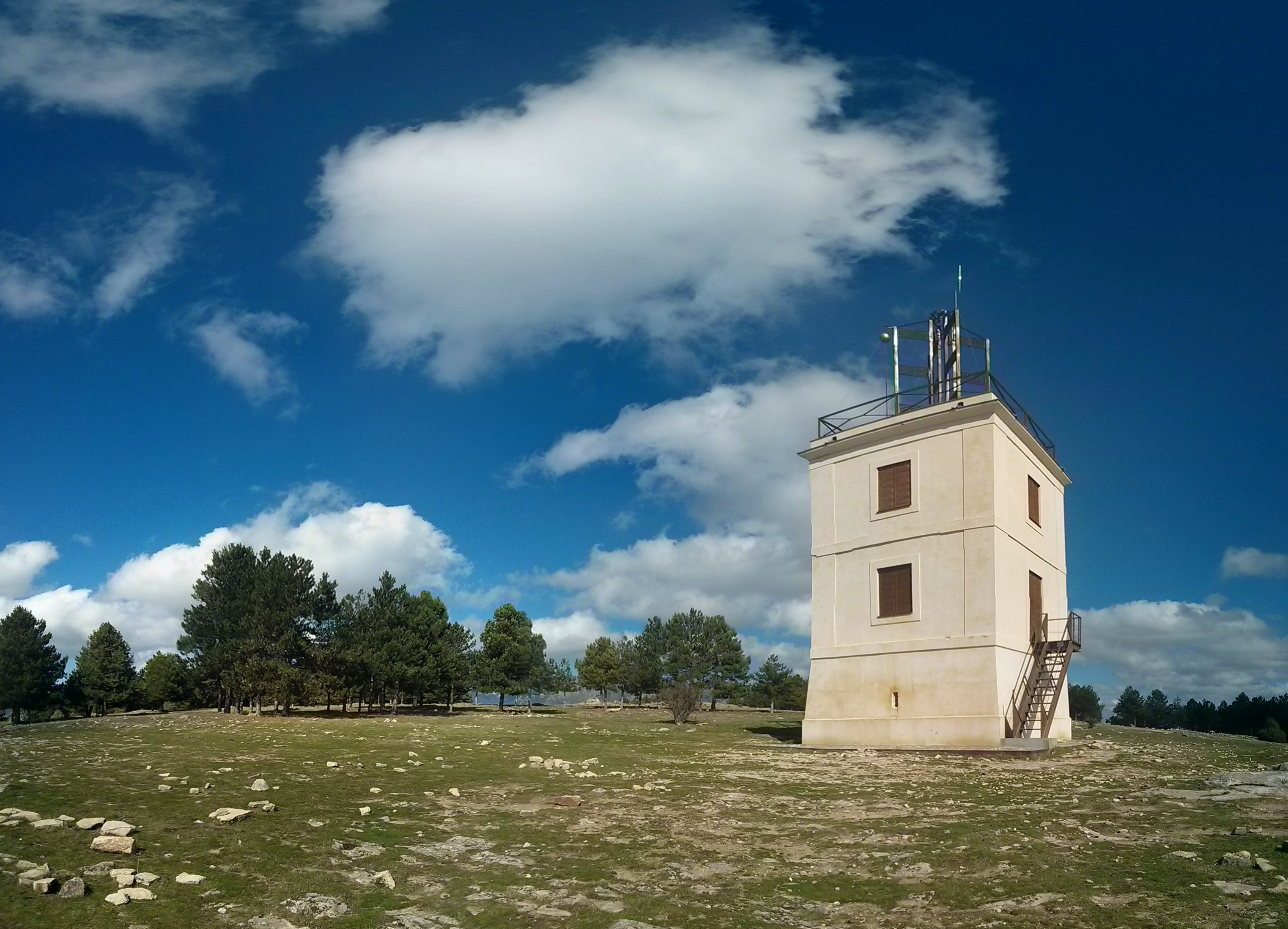 Foto panorámica (montaje fotográfico) de la torre de telegrafía óptica del cerro de Cabeza Mediana (Comunidad de Madrid). Torre nº 5 de la línea de Castilla.